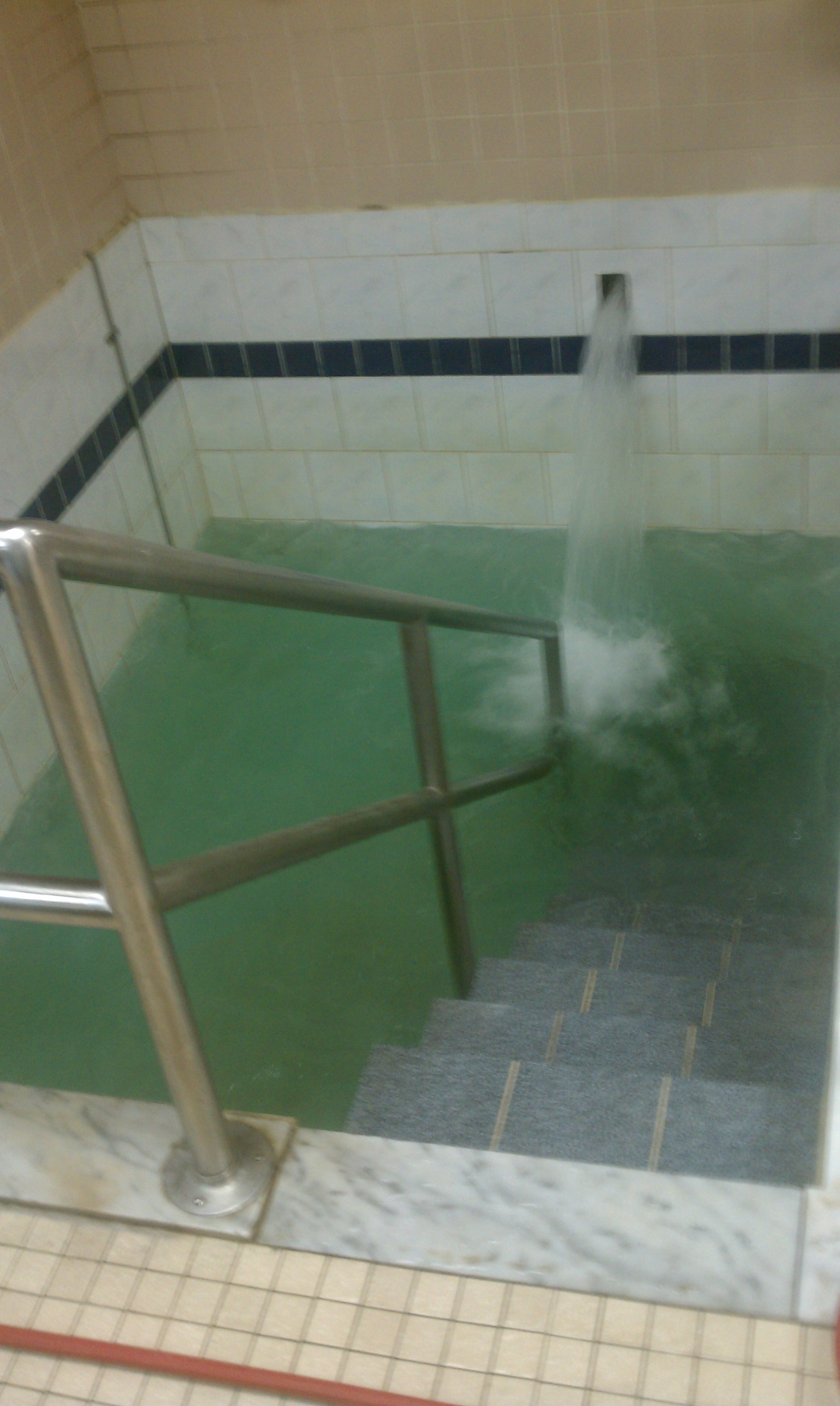 מילוי המקווה